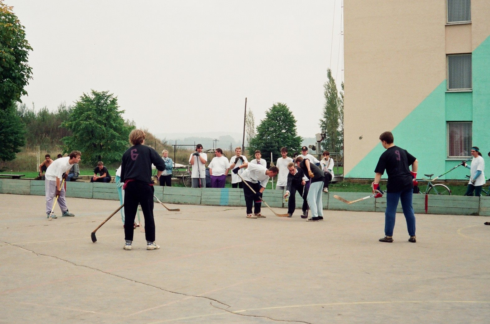 A-tým Olympu zachycen při svém prvním utkání v historii